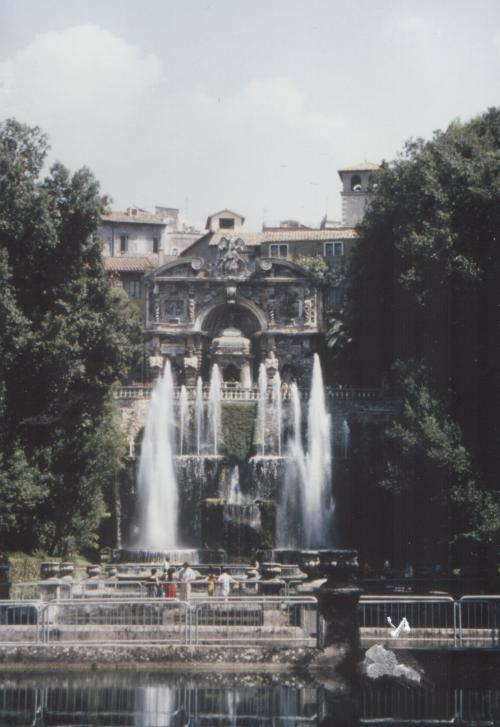 Villa d'Este Tivoli, Privatfoto 1995, GNU-FDL